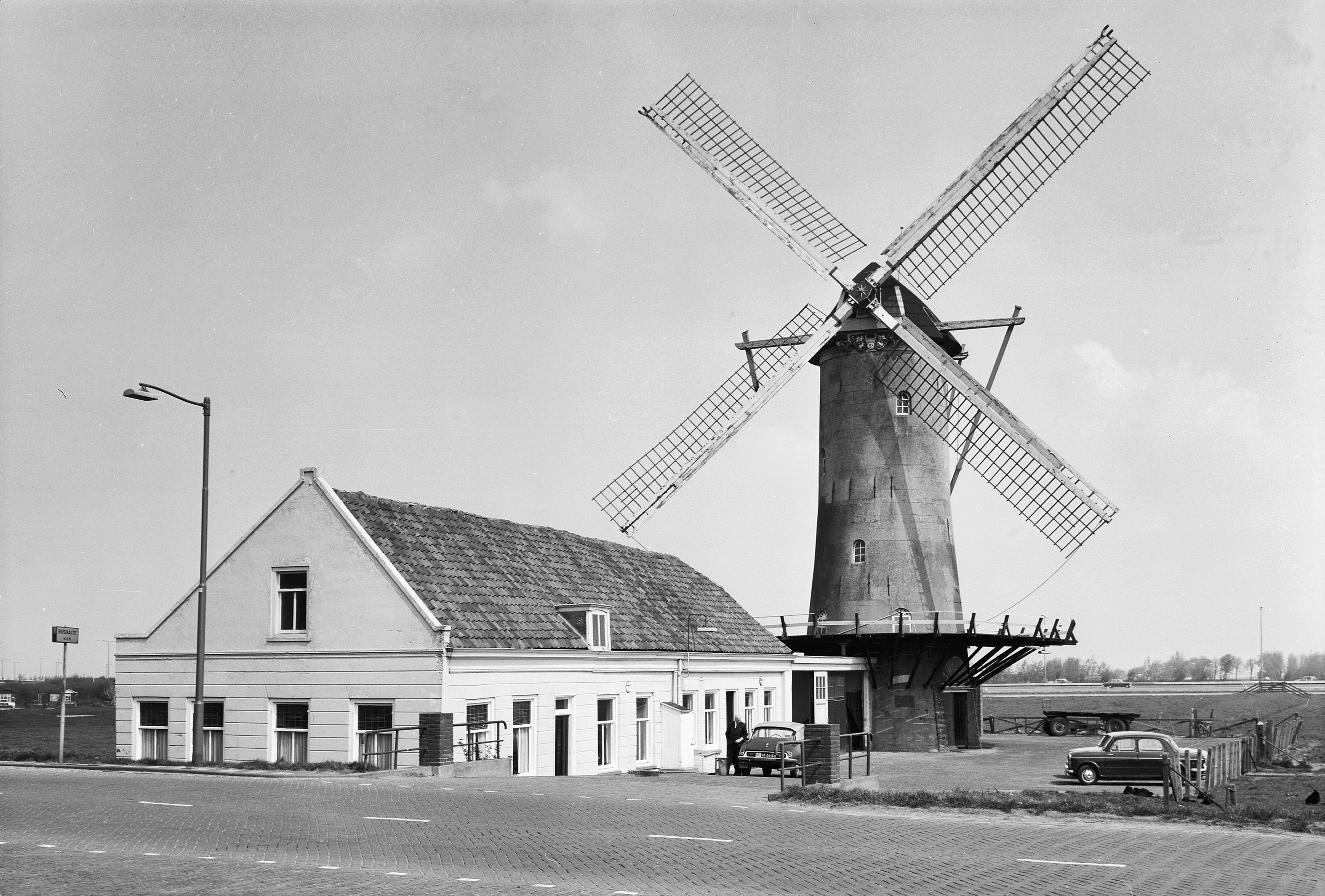 Korenmolen, Delftweg 110 (1712)